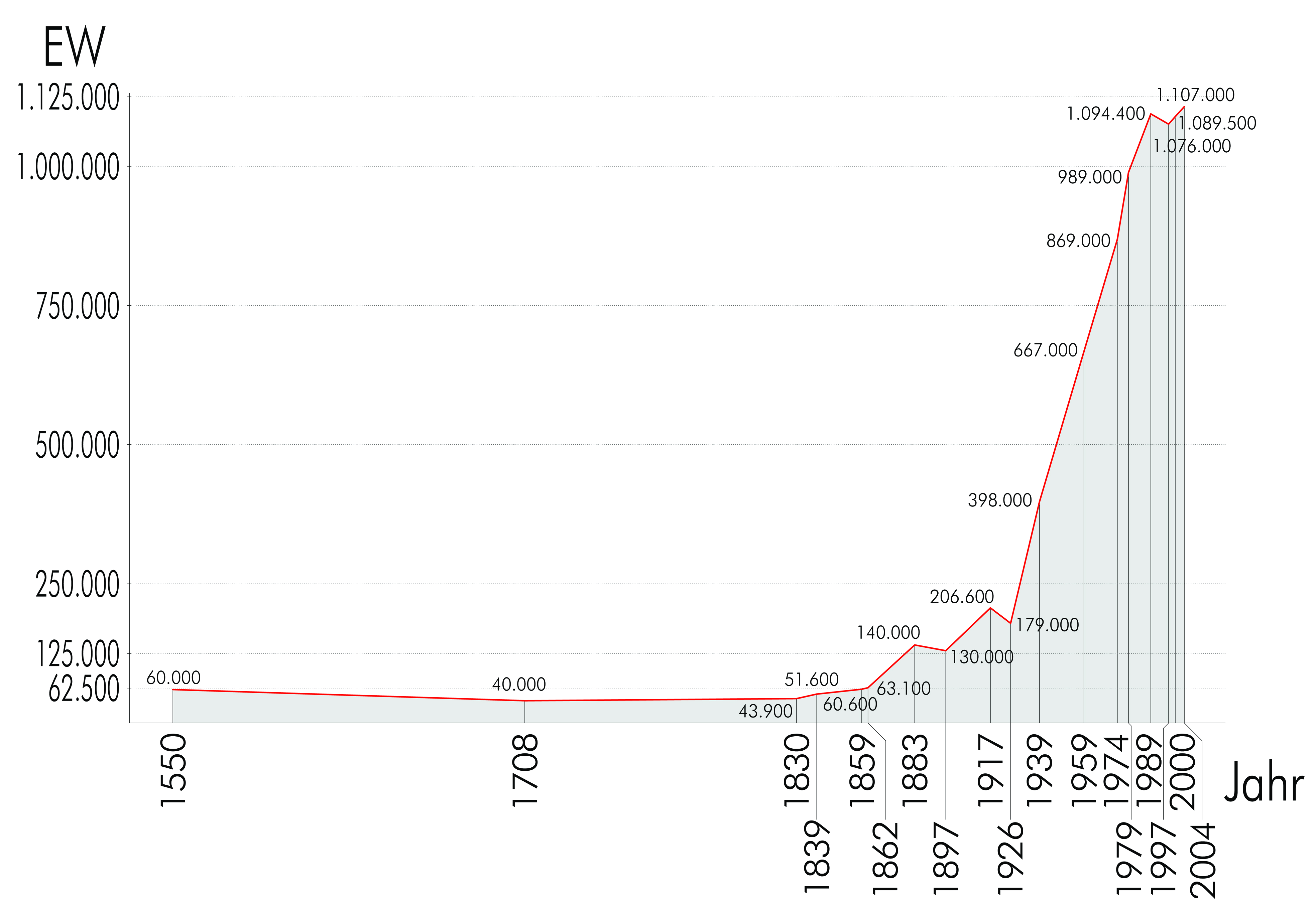 Diagramm Einwohnerentwicklung der russischen Stadt Kasan